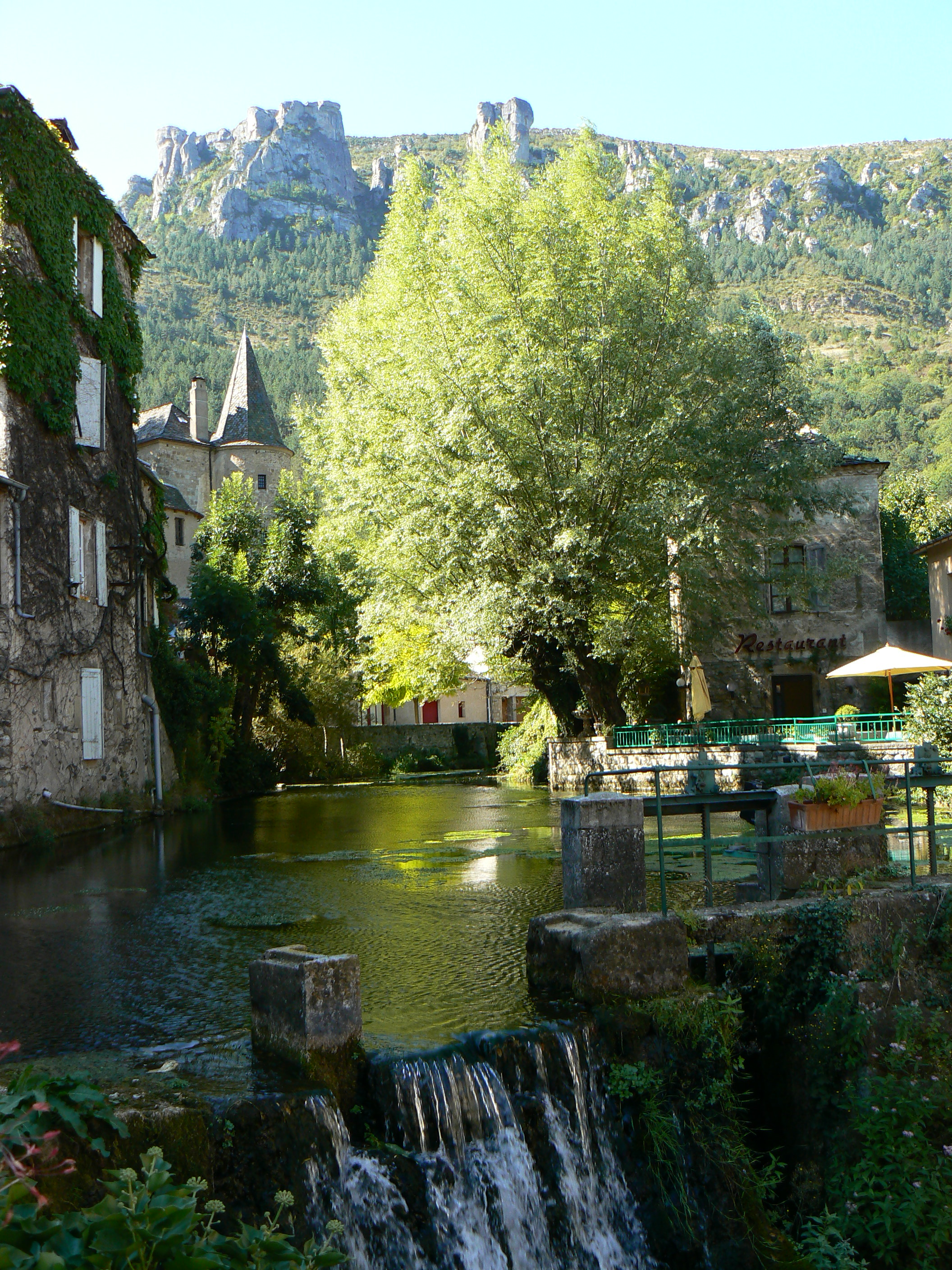 La source du Pêcher (le Vibron, résurgence du Tarn) à Florac en Lozère